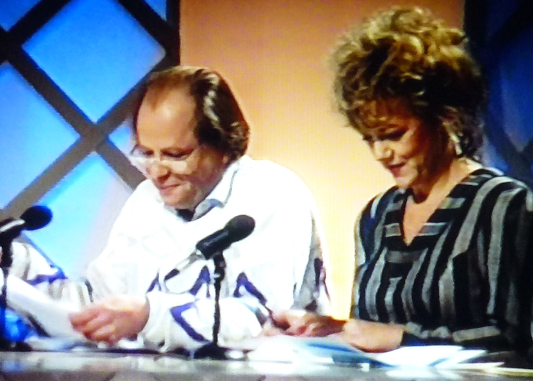 TV-inspelning av programmet "Babbel" på "Vision 86", Stockholmsmässan. Skärmfoto från egen video. Helge Skoog, Mona Seilitz